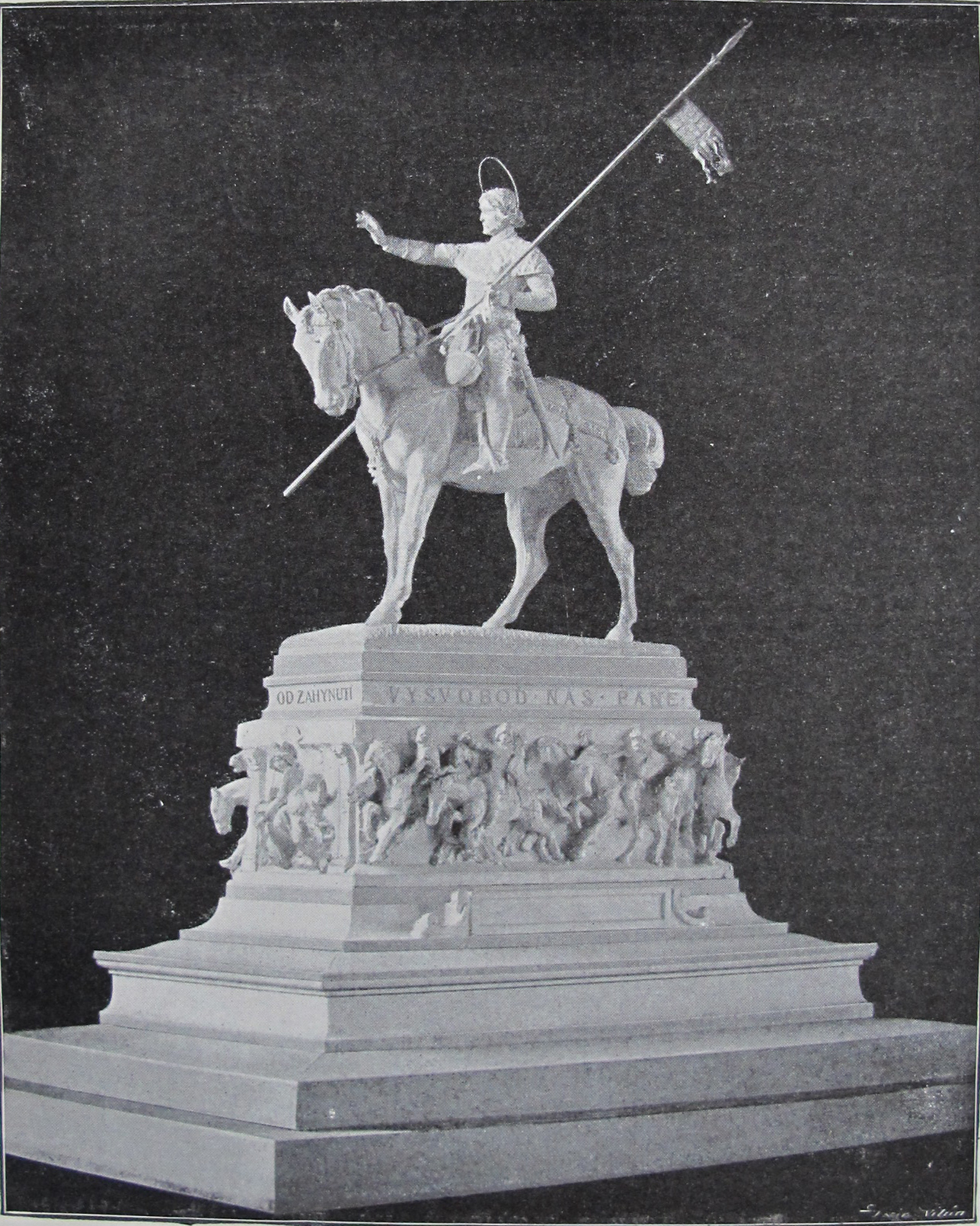 Původní popisek: BOH. SCHNIRCH: SV. VÁCLAV.